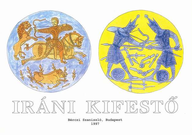 Két ezüsttál vadászattal és küzdelemmel Iránból